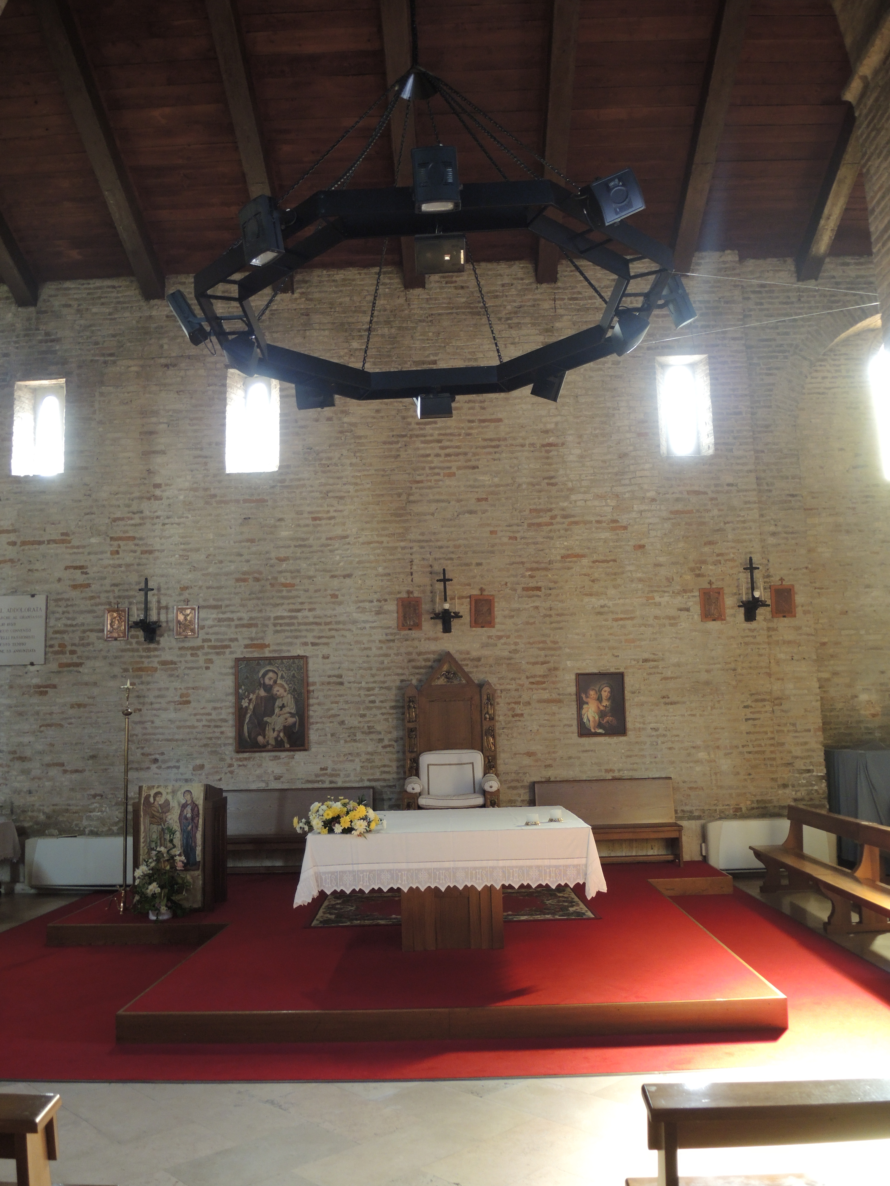 Giulianova - Chiesa di Santa Maria a Mare